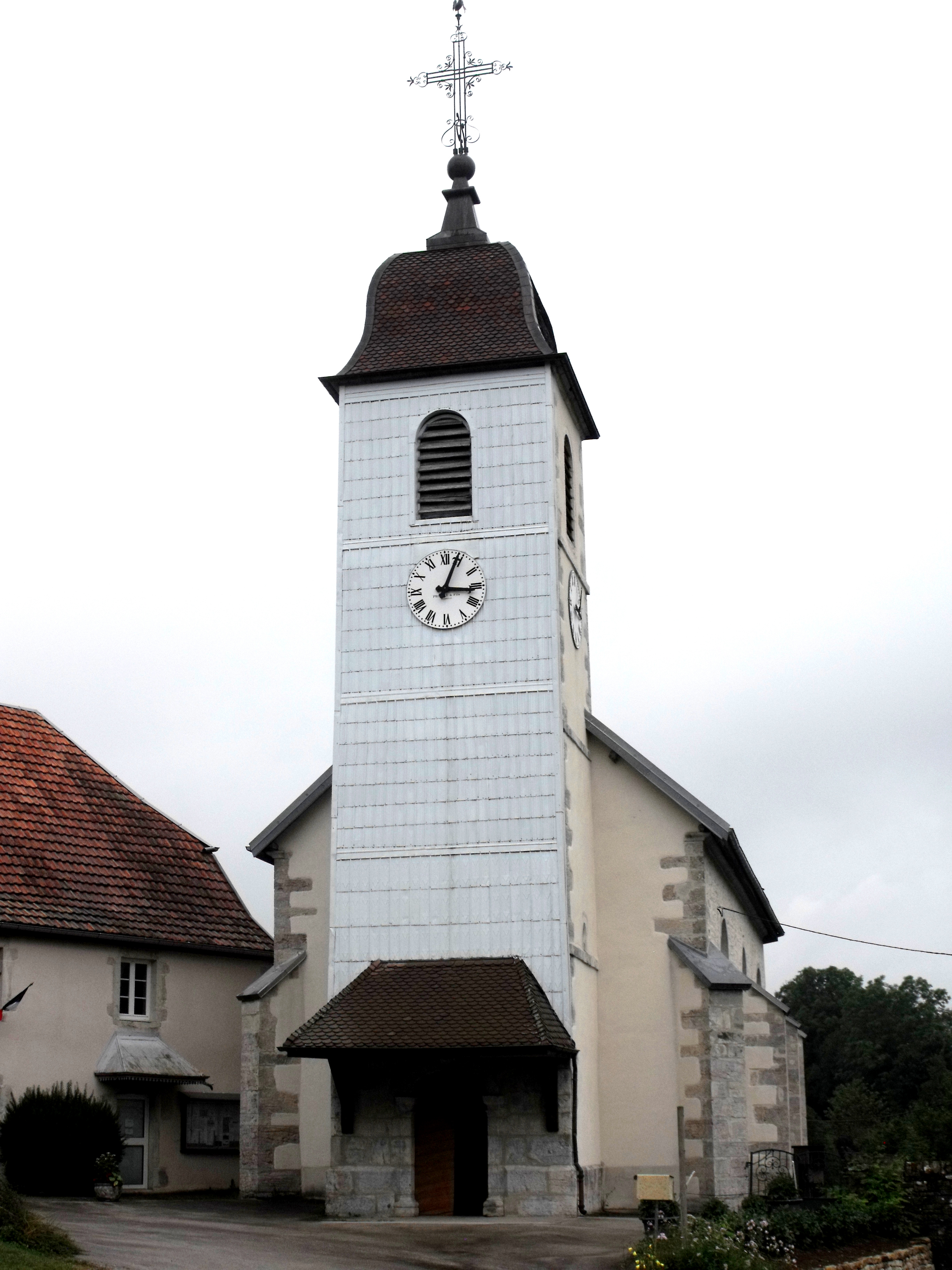 Eglise de La Grange, Doubs, France